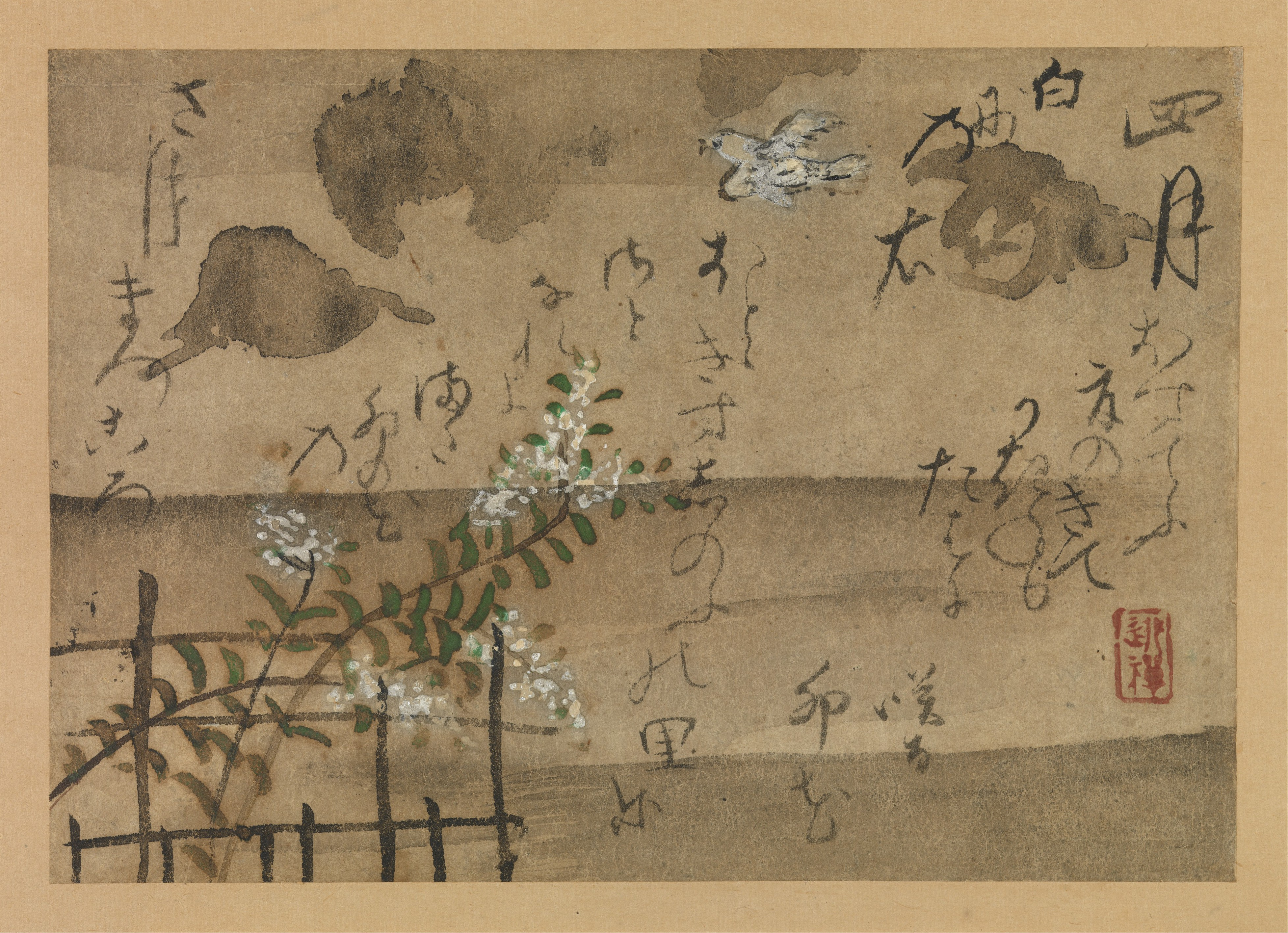 Japan; Hanging scroll; Paintings